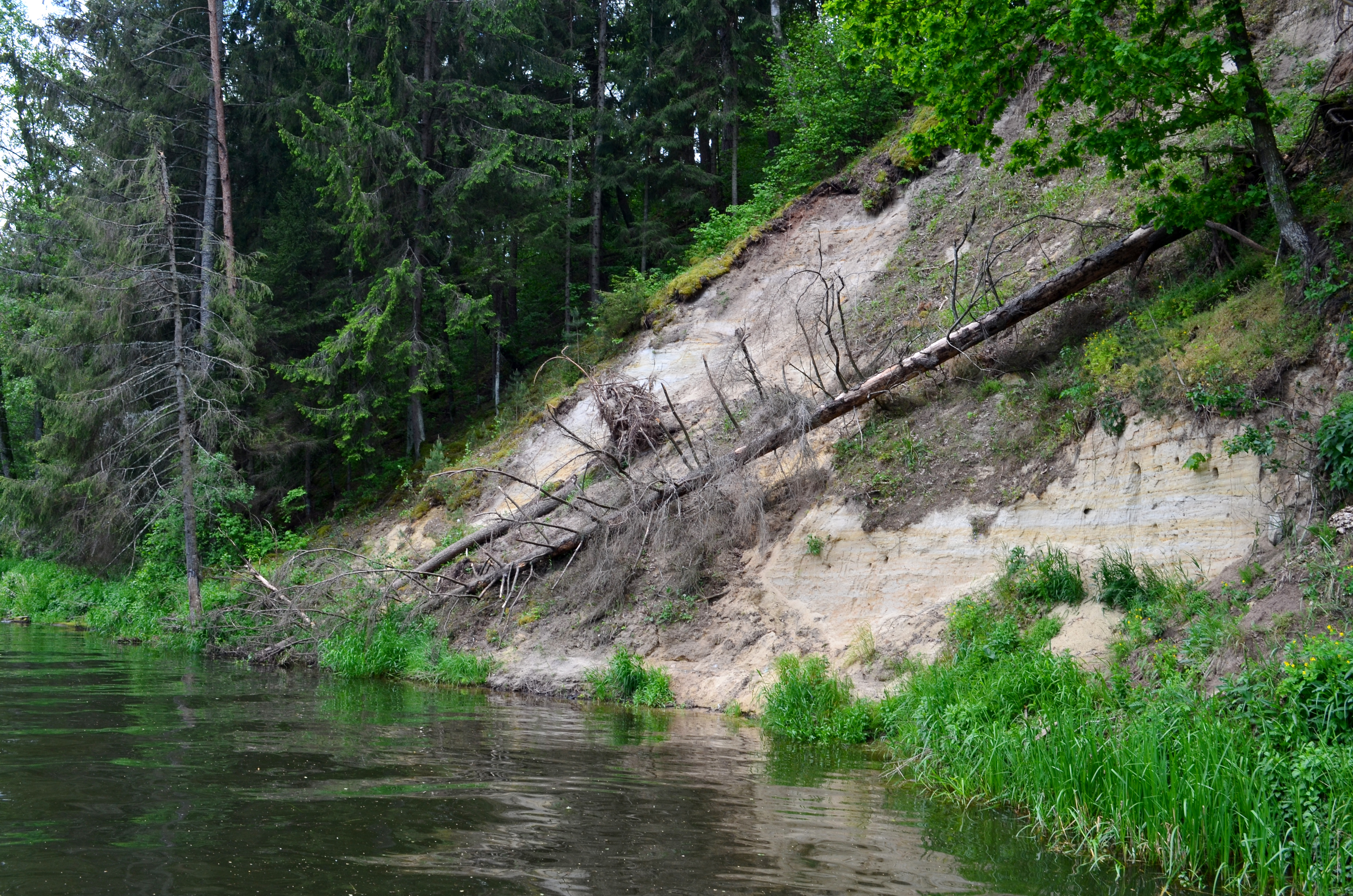 Vetygalos atodanga, Anykščių raj.